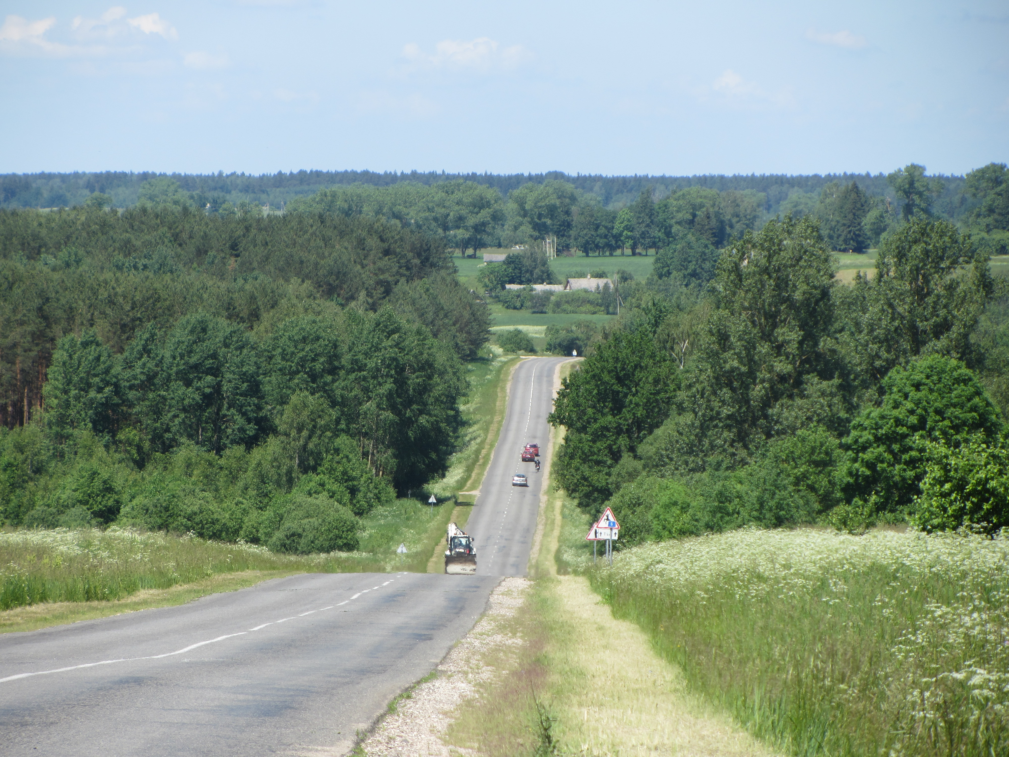 Jauniūnų sen., Lithuania